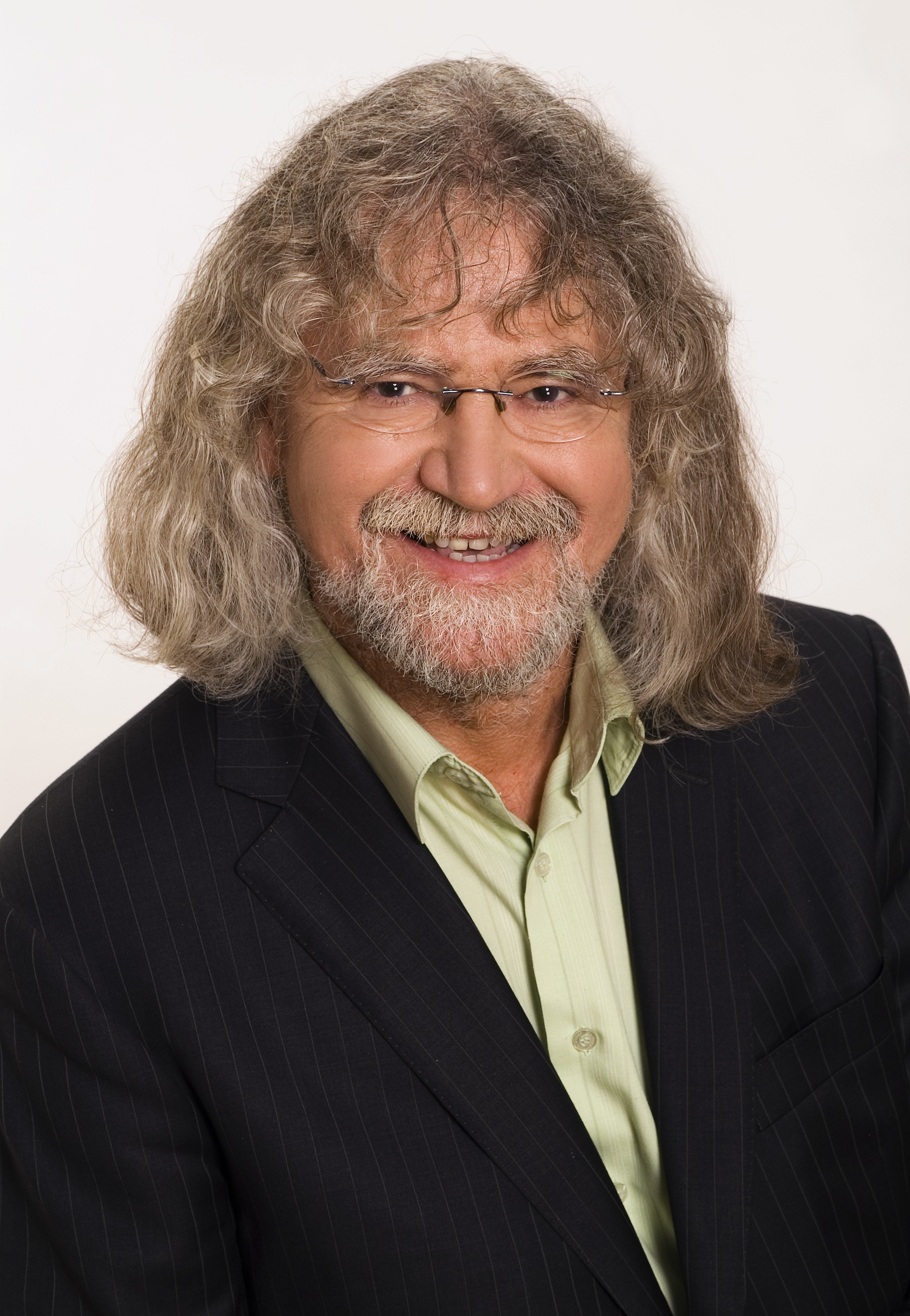 Ladislav Vrchovský, fotografie: Strana zelených